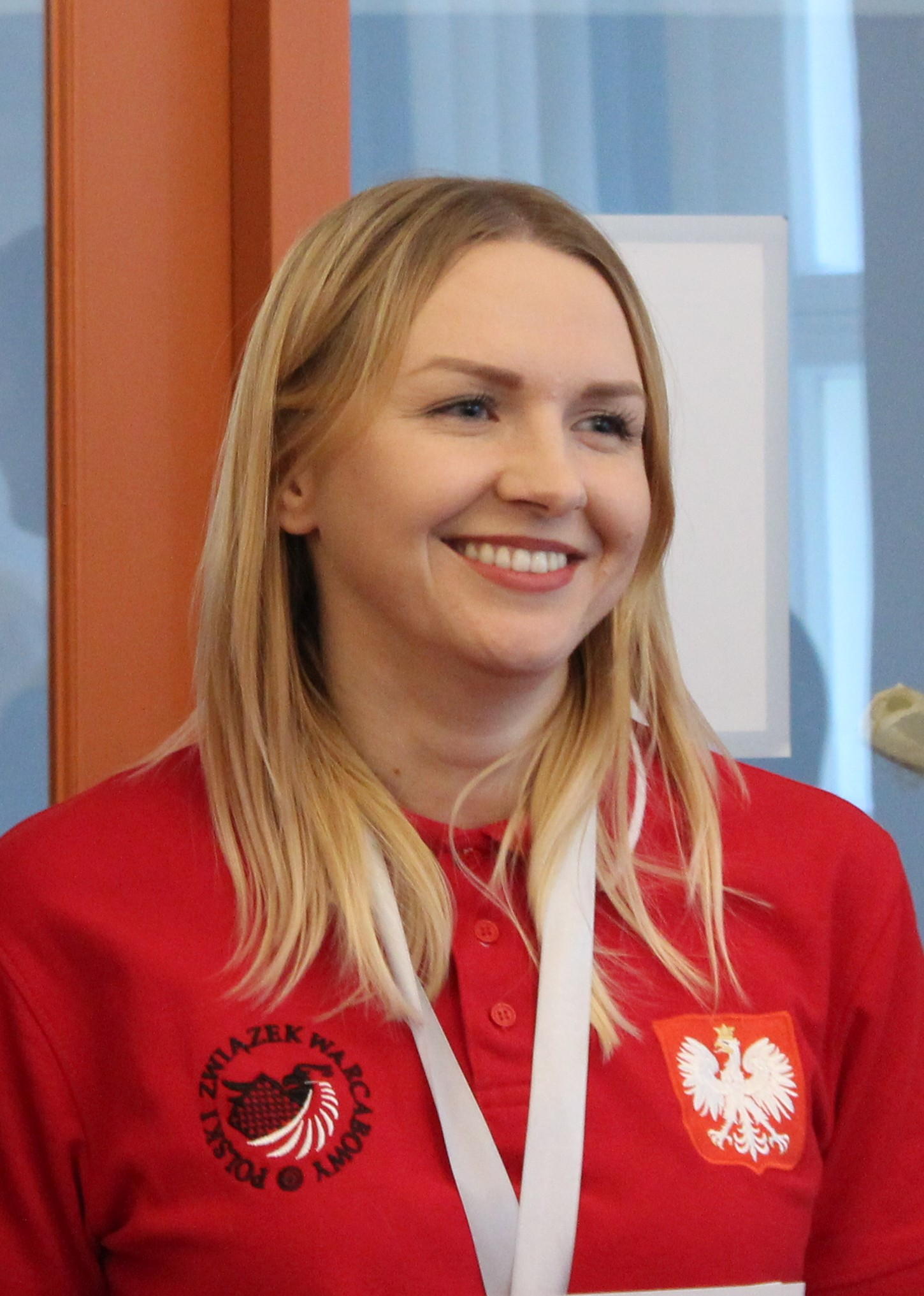 Natalia Sadowska Euroopa võistkondlike meistrivõistluste lõpetamisel Tallinnas